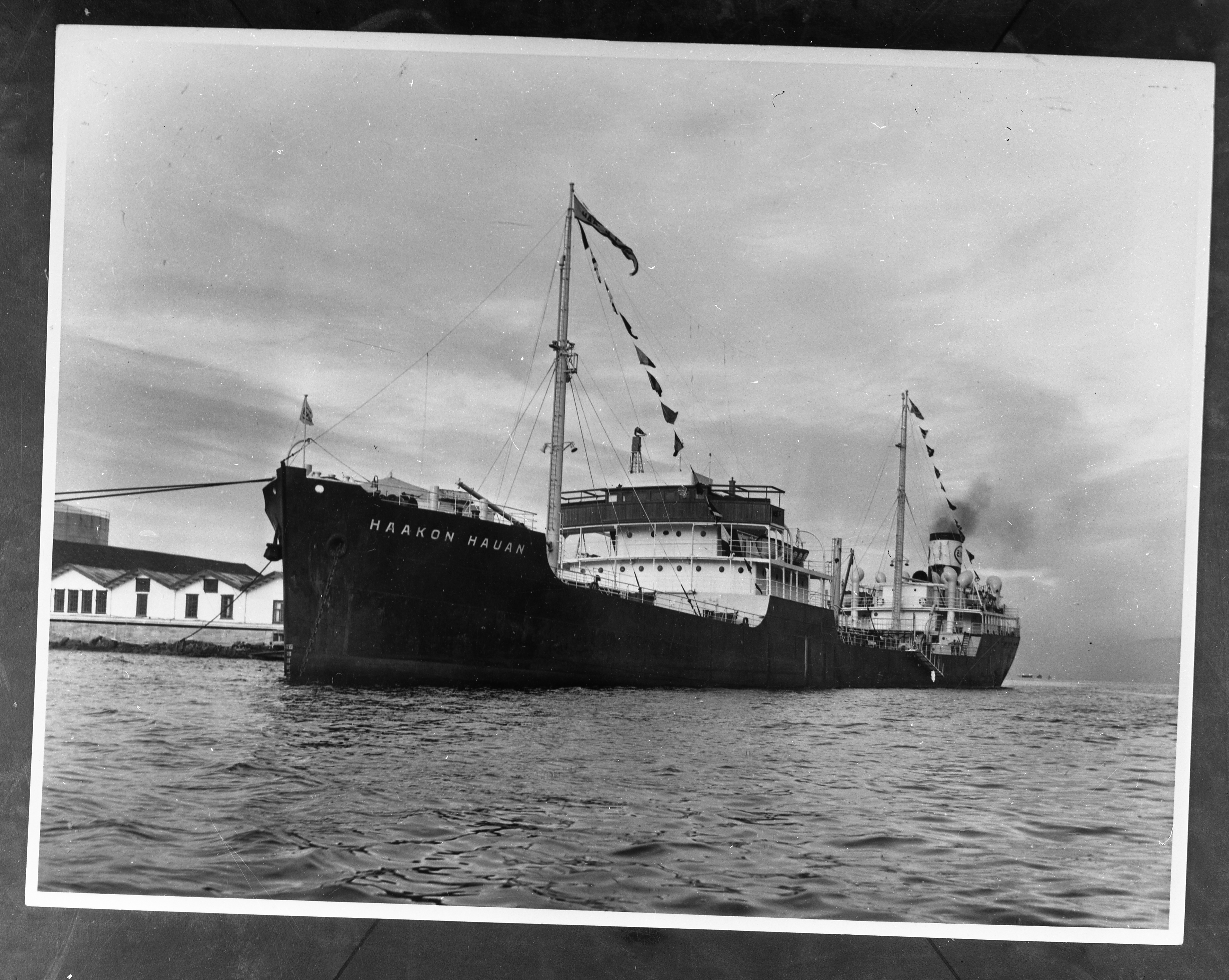 Bildet er hentet fra Arkivverket. M/T Haakon Hauan Arkivinstitusjon : Statsarkivet i Stavanger Arkivnavn : Pa 0982 - Esso Norge A/S Sted : Norge, Ukjent, Ukjent, Emneord: Olje, Petroleum, Tankanlegg, Tankbåt Avbildet